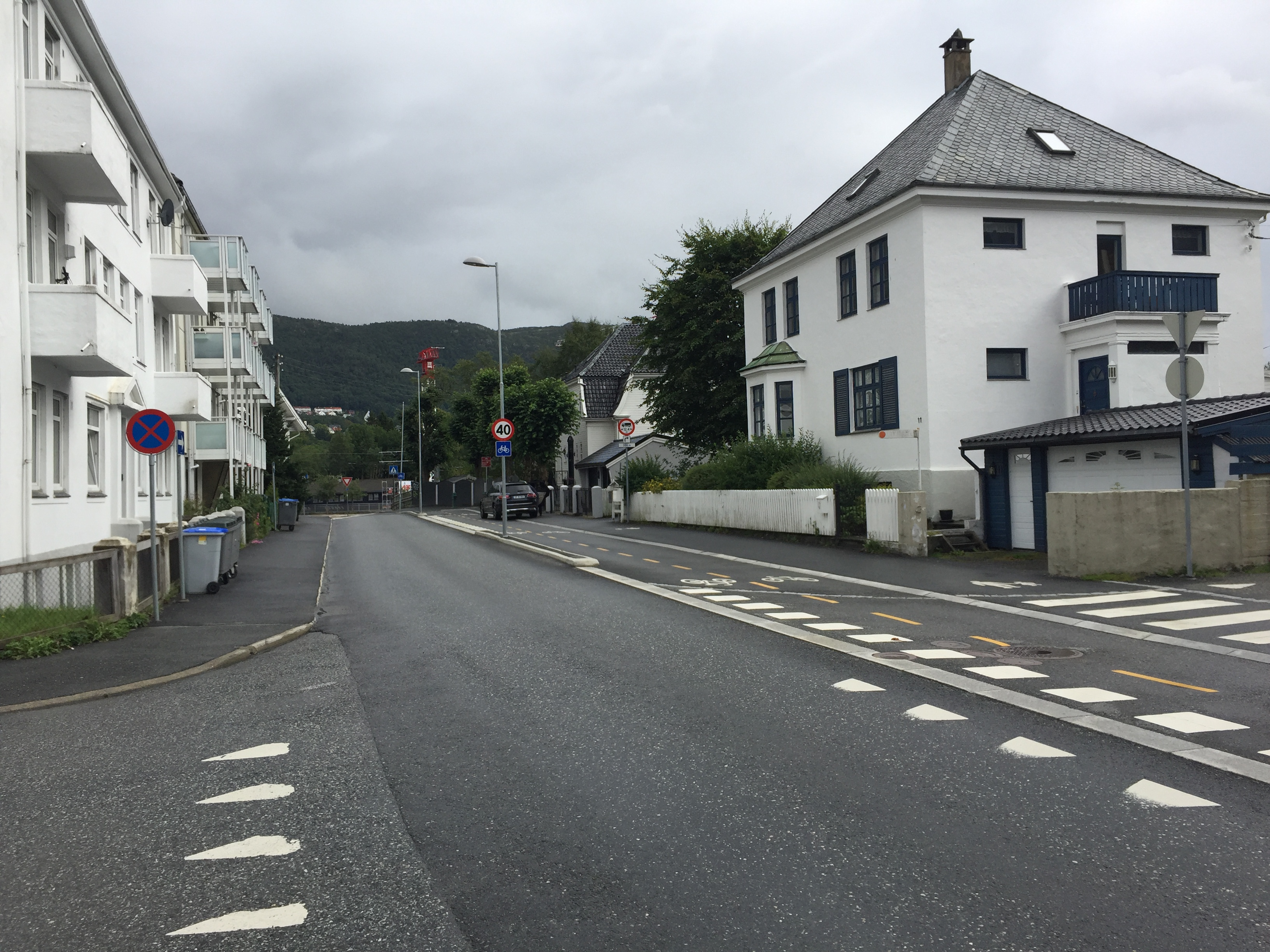 Parti av Fabrikkgaten. Sett fra krysset Krohnhaugen mot Inndalsveien. Deler av gaten er nå enveiskjørt og det er separat sykkelsti og fortau.